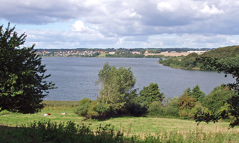 Stilling-Solbjerg Sø, Århus/Skanderborg Amt Jylland , Denmark. I baggrunden ses byen Stilling.